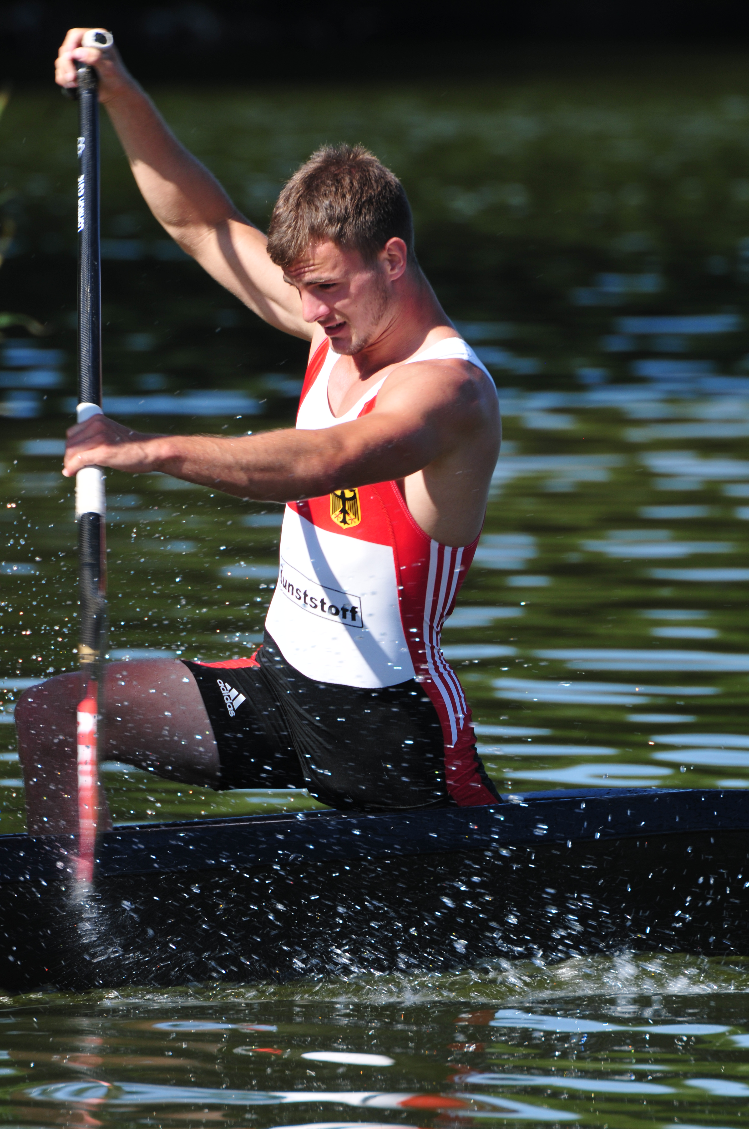 Bundesleistungszentrum Kienbaum; Training Kanuten